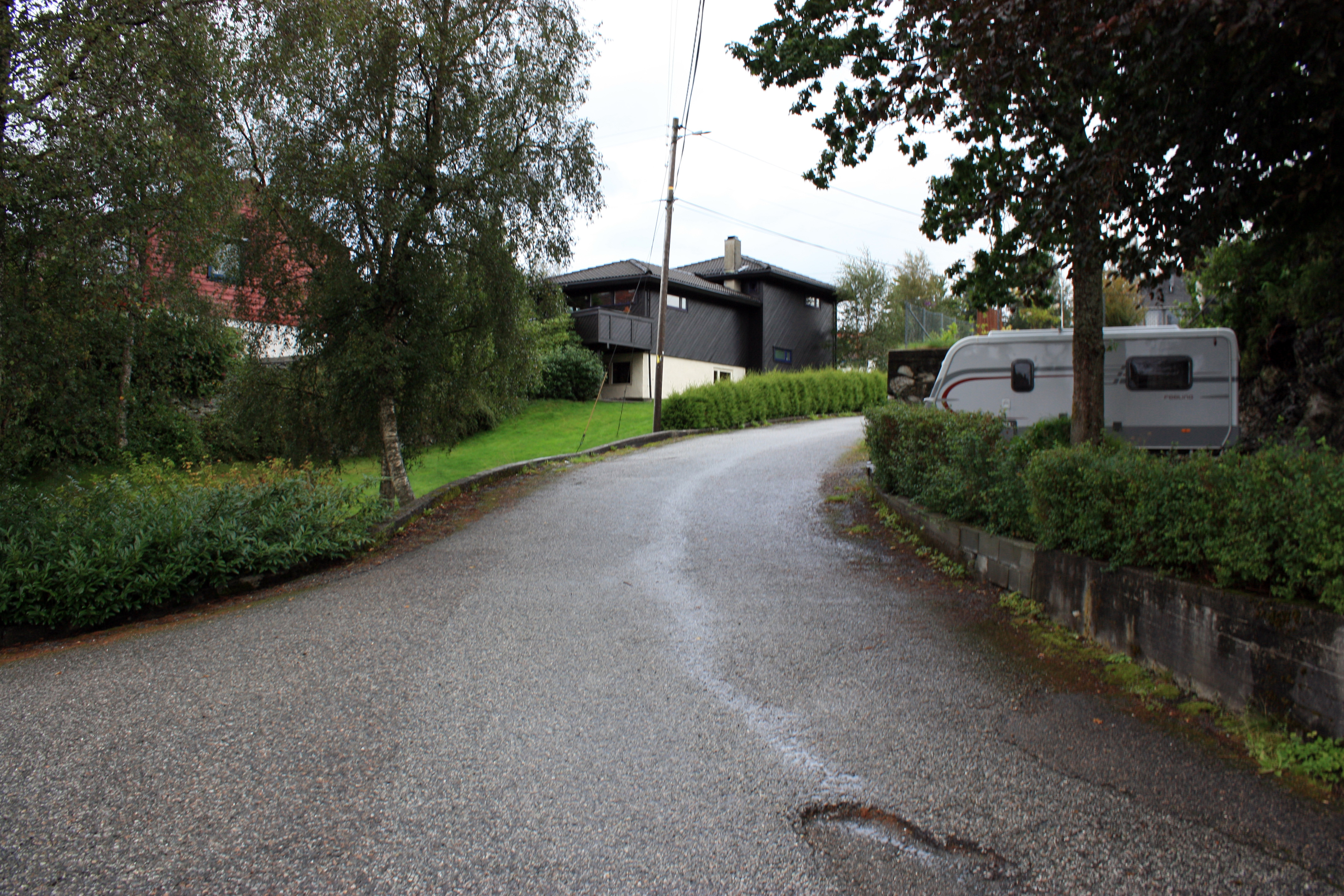 Nordre Otervegen, Fana, Bergen.